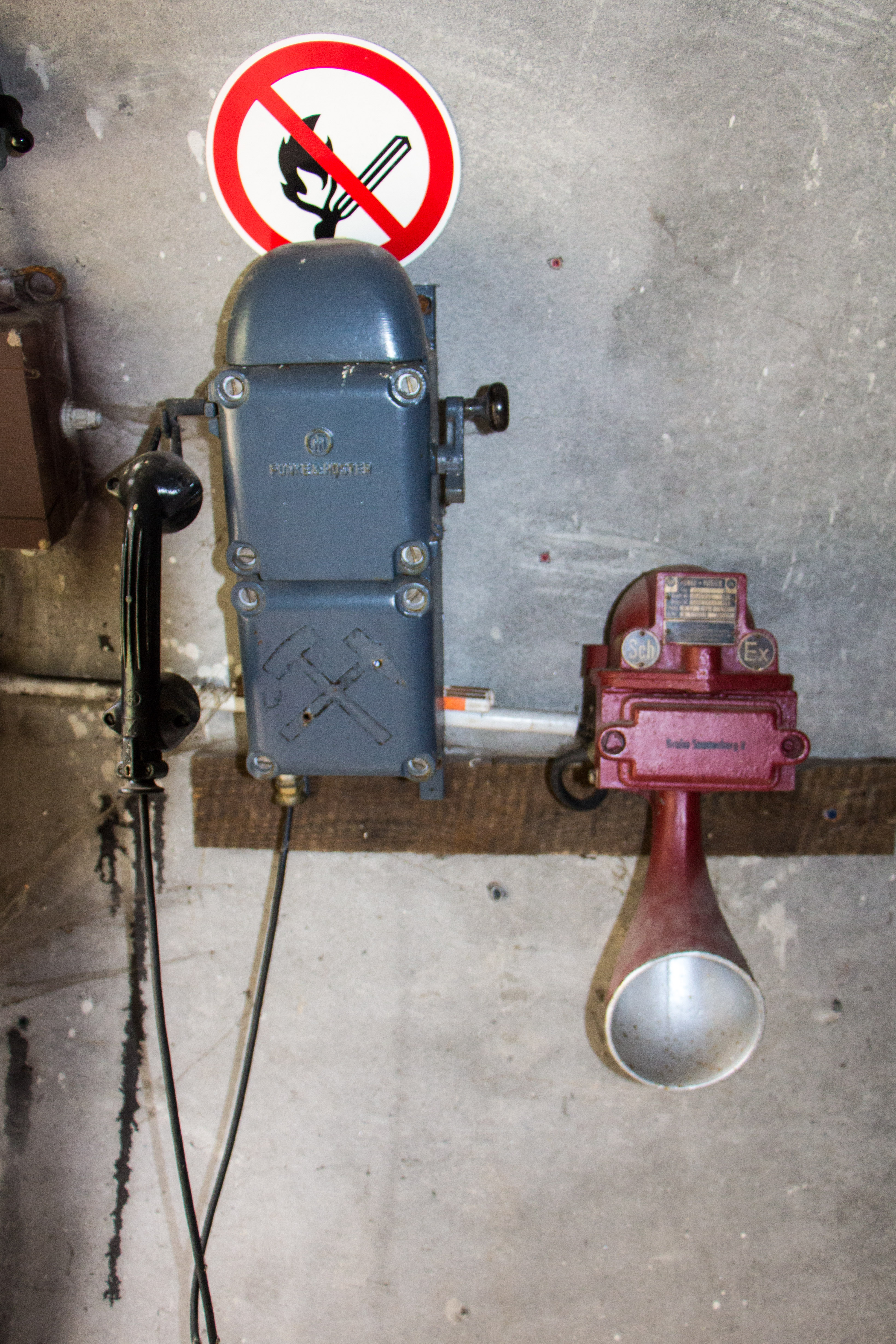 Underground mineshaft telephone displayed at the / in Germany. "Telefonanlage für Untertagebergbau, ausgestellt im Feldbahnmuseum Wiesloch, 2013"